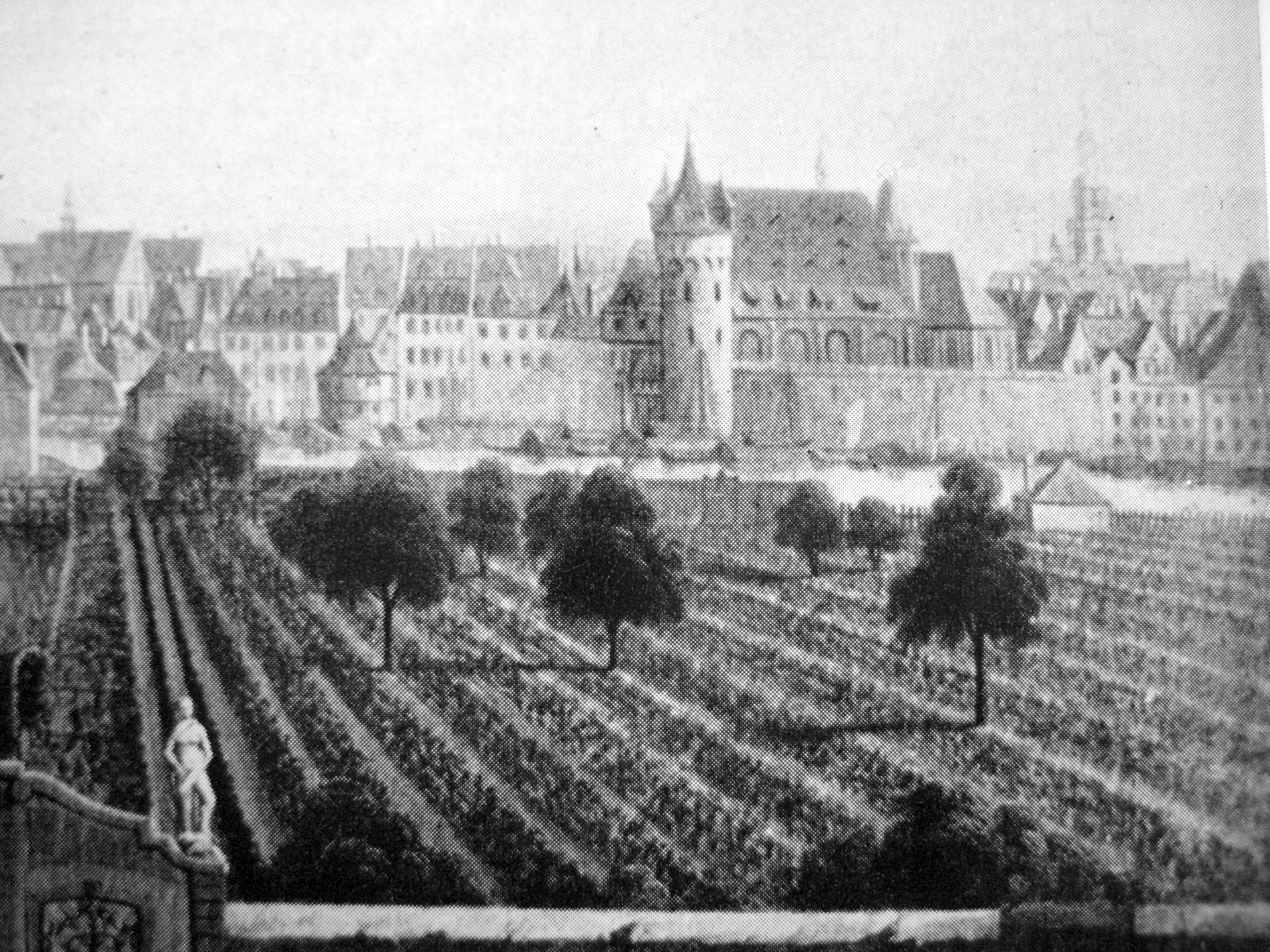 Ölgemälde: Gärten am Schaumainkai um 1800, rechts Häuschen und Garten Salzwedels und auch: Die Weingärten des Reichsfreiherrn Joahnn Peter Leonhardi um 1800. Johann Peter von Leonhardi (1747–1830), Frankfurter Bankier, Kaufmann, Politiker und Freimaurer. Ursprünglich stammt seine Familie aus Waldeck, er war die 2.Generation in Frankfurt. Er wurde als angesehener Bankier und Ratsherr der Stadt 1794 von Kaiser Leopold II, dem Sohn Kaiserin Maria Theresias, in dessen letztem Regierungsjahr in den Reichsgrafenstand erhoben. 1806 Bauherr der Villa Leonhardi in Frankfurt Westend; Käufer des sog. Leonhardischen Schlosses in Groß-Karben, das heute noch im Familienbesitz ist.